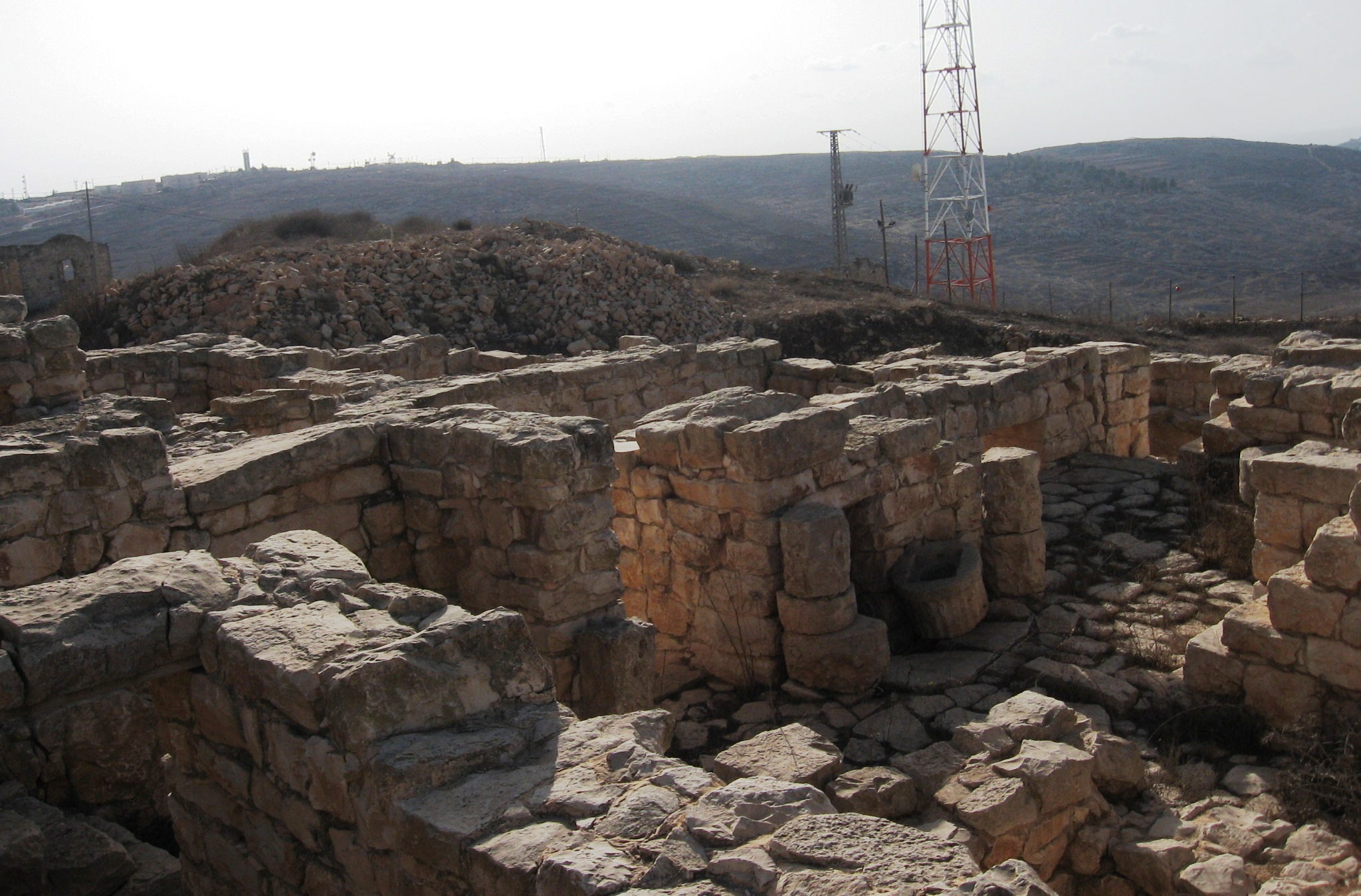 תרבות השומרונים בהר גריזים